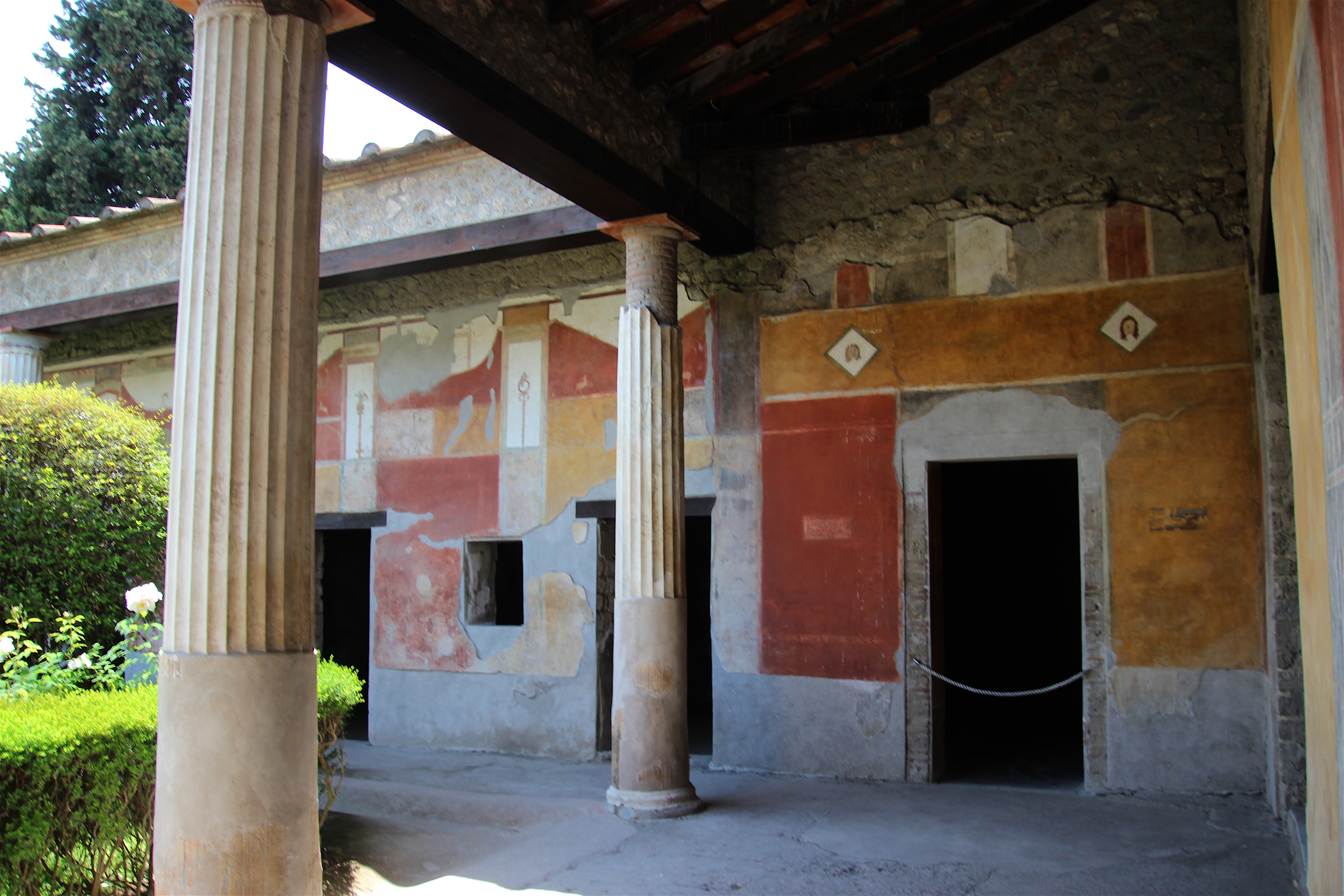 Pompeya. Casa de la Venus en la concha.